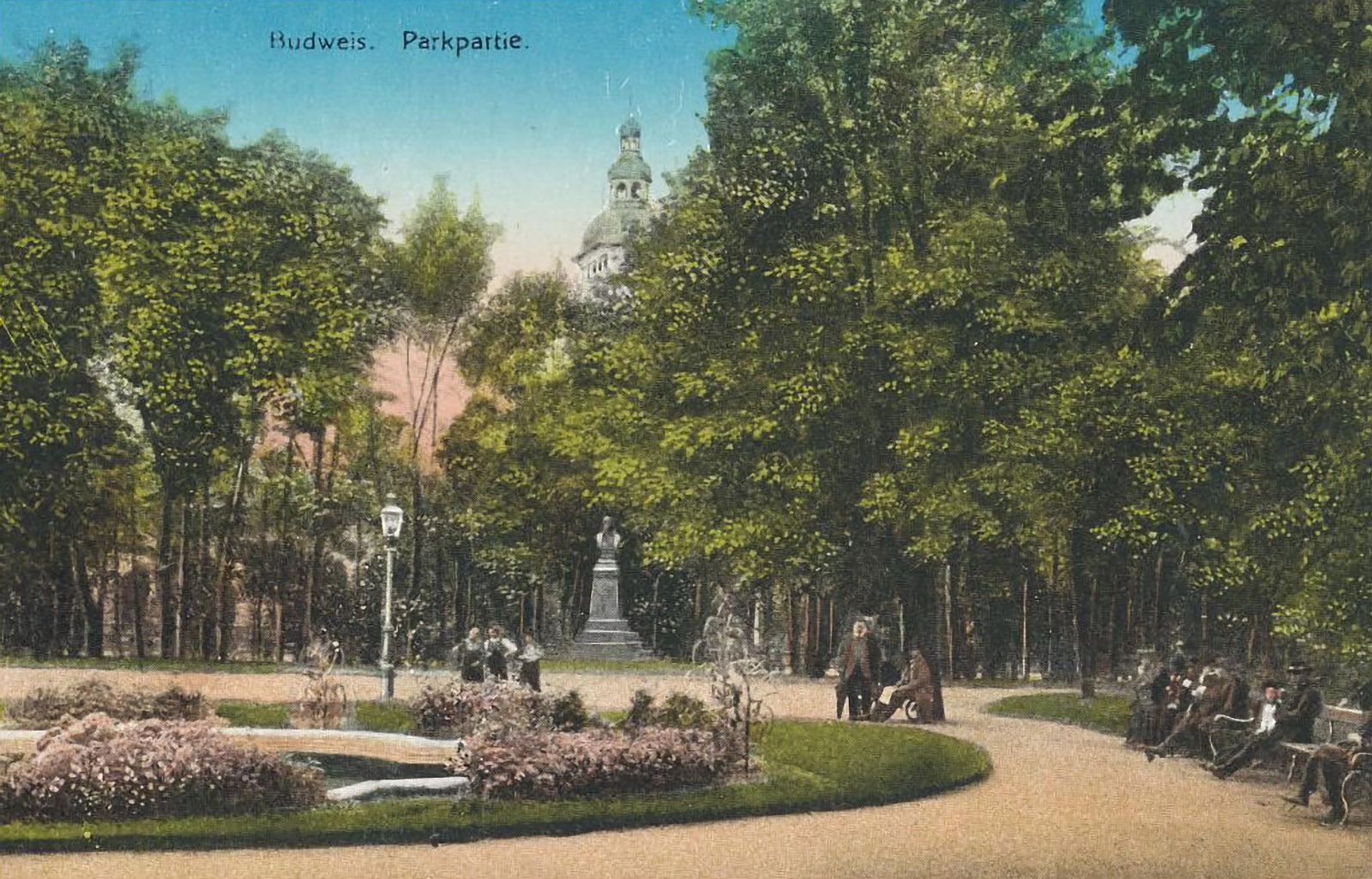 Sady ne později než roku 1918, České Budějovice.